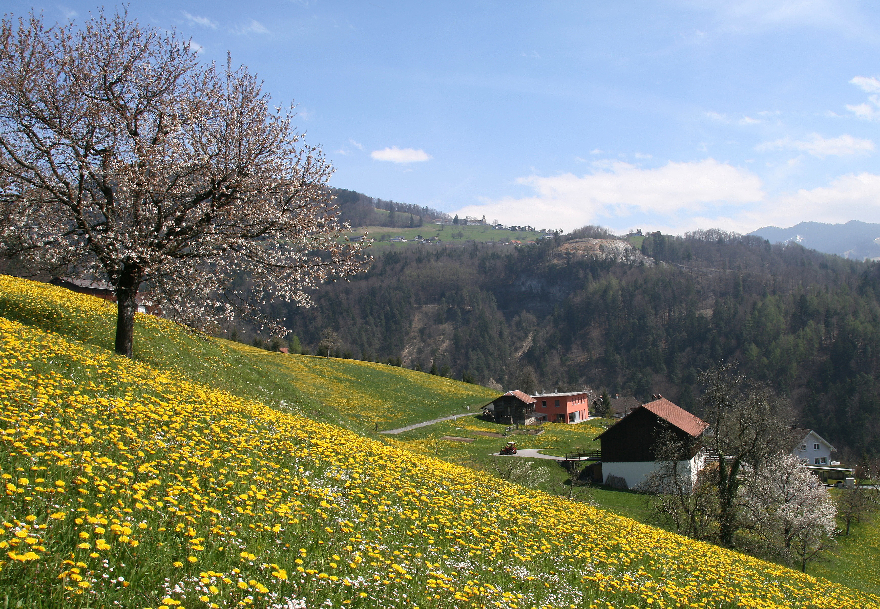 Habitat des Gewöhnlichen Löwenzahn (Taraxacum sect. Ruderalia) Er stellt eine Gruppe äußerst ähnlicher und stark verwandter Pflanzen in der Gattung des Löwenzahn´s (Taraxacum) aus der Familie der Korbblütler (Asteraceae) dar. Blick vom Ortsteil Halden in Weiler auf den Viktorsberg in Vorarlberg.